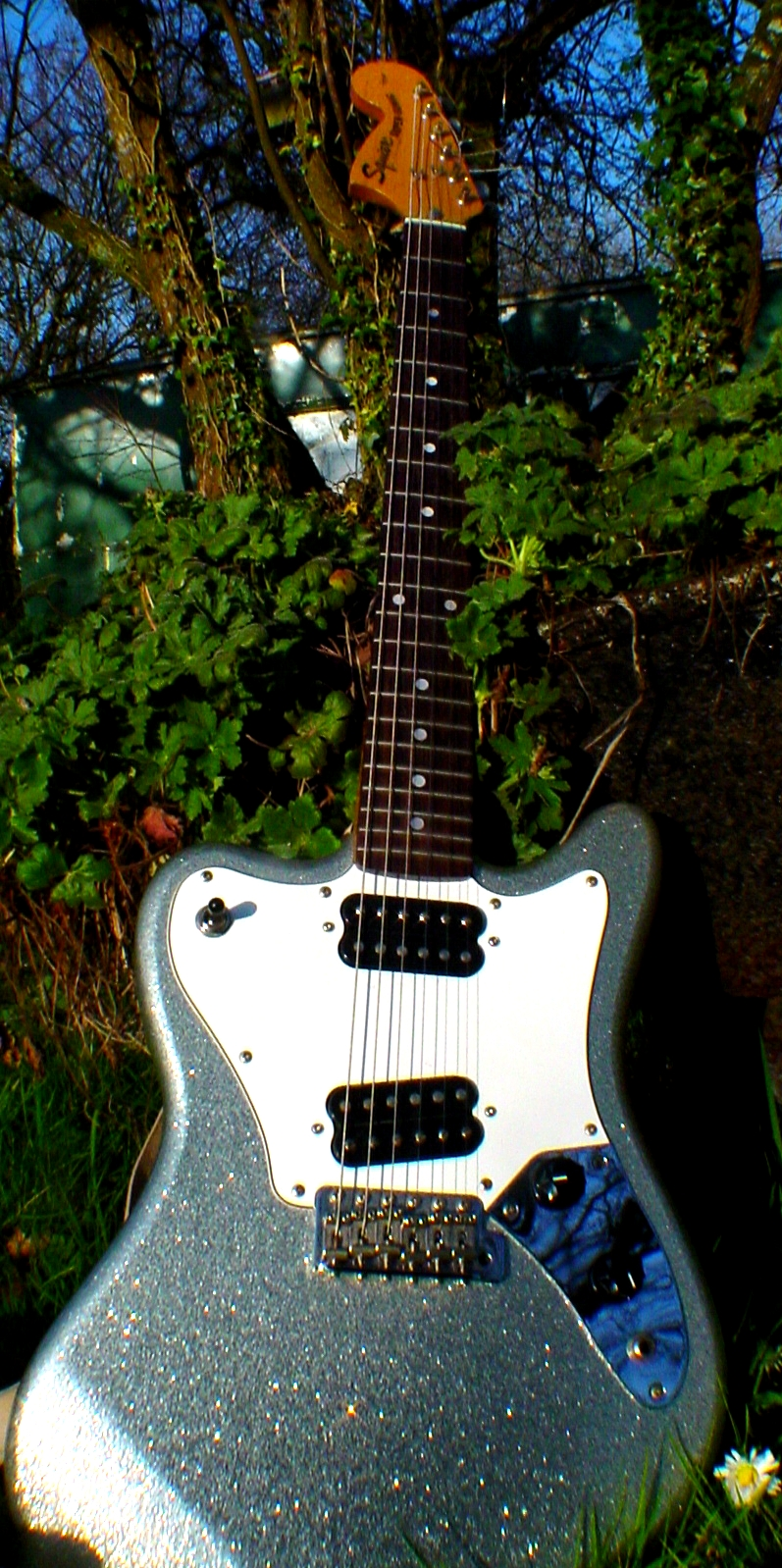 Silver Squier Super-Sonic, R.Godwin